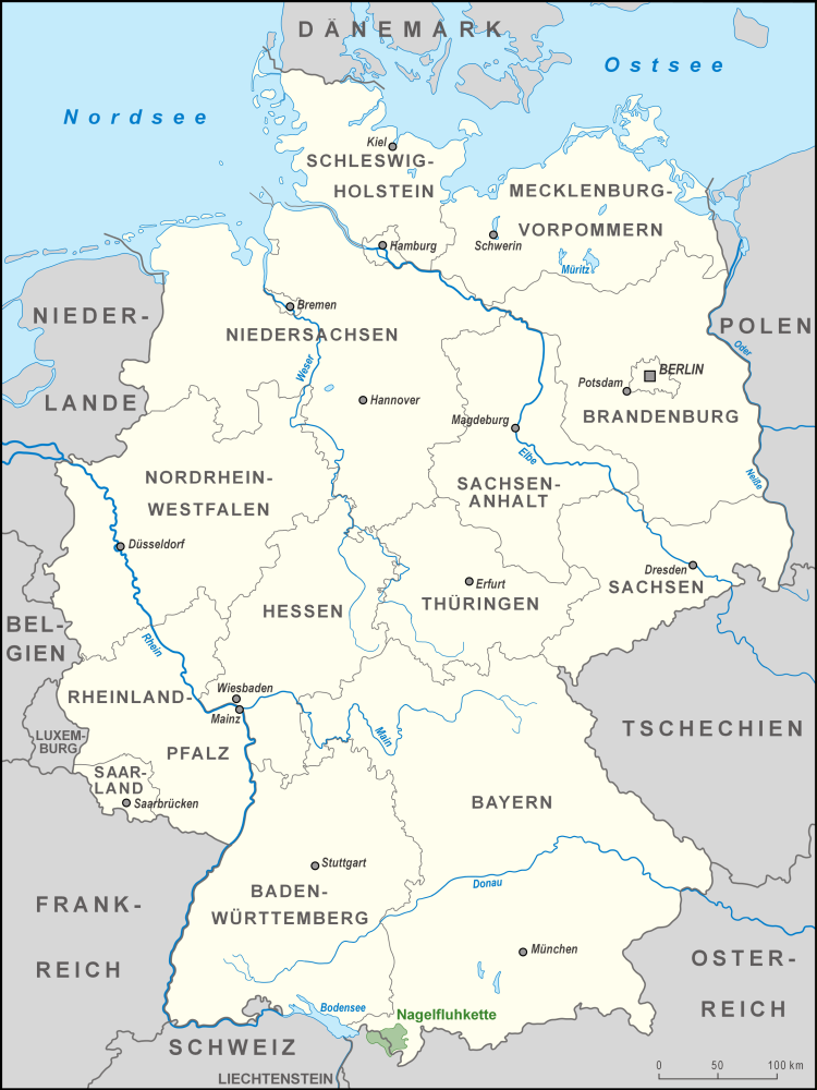 Karte des Naturparks Nagelfluhkette in Deutschland